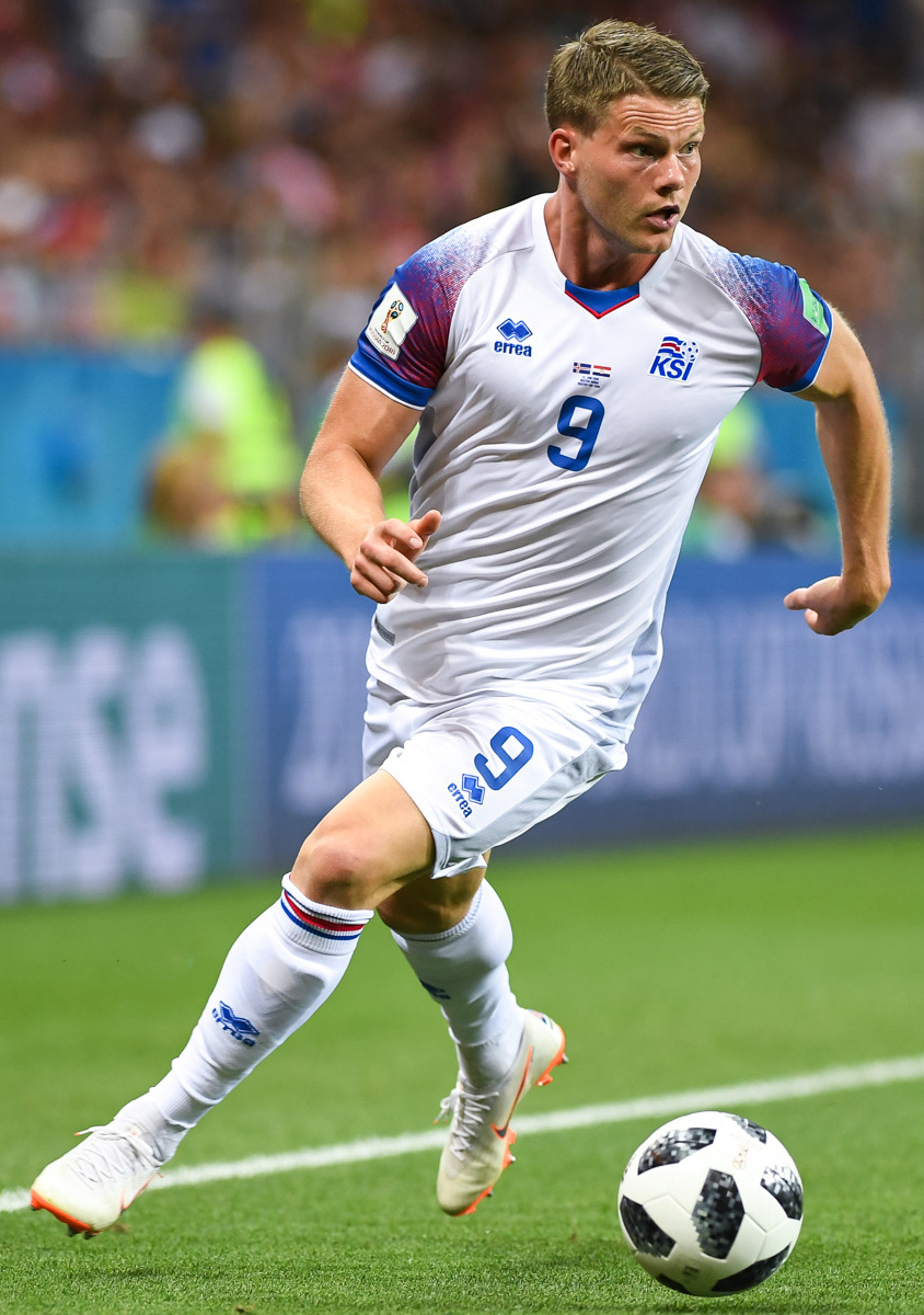 Сборная Исландии уступает Хорватии и покидает ЧМ-2018